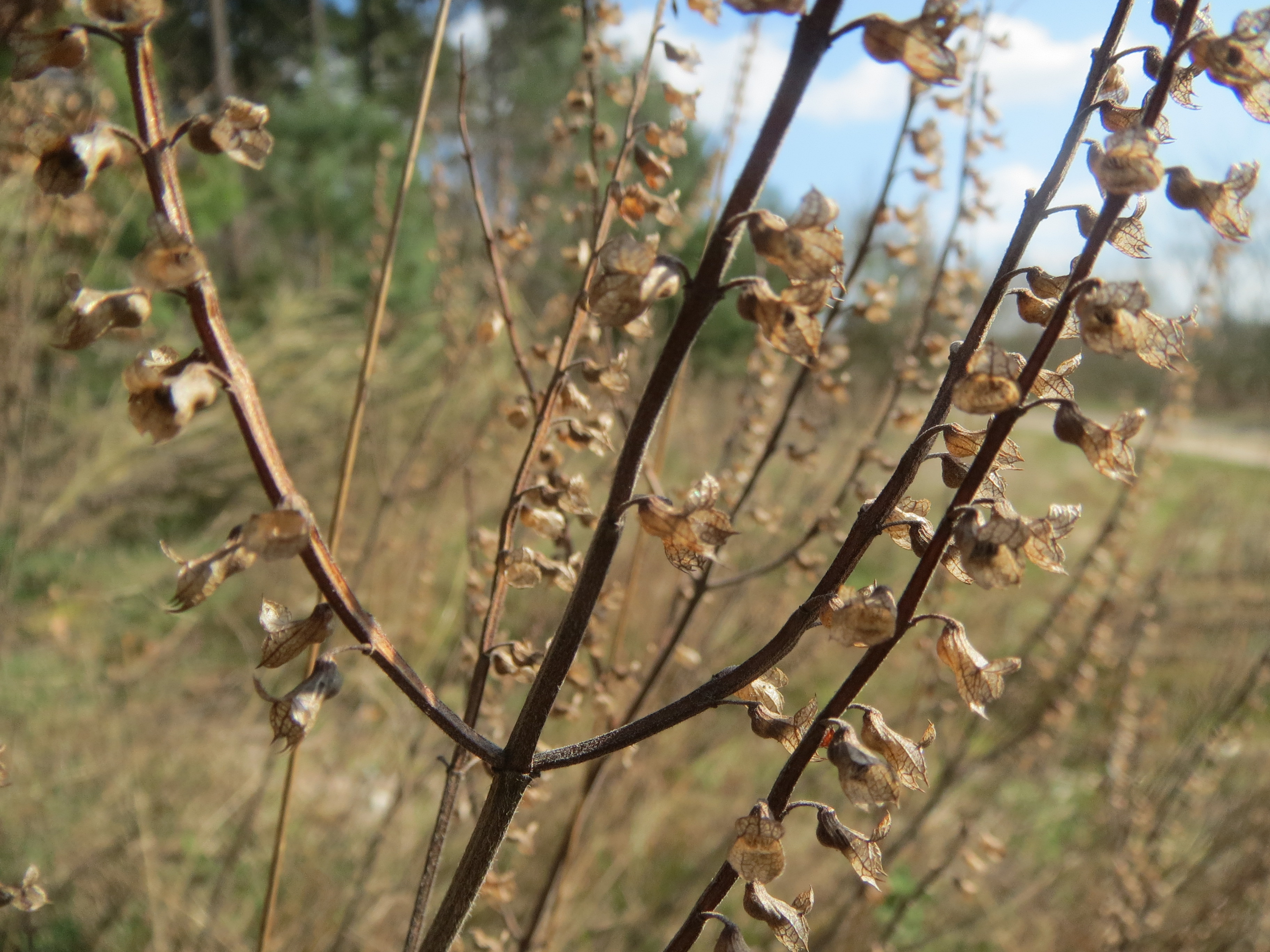 Salbei-Gamander (Teucrium scorodonia) im Schwetzinger Hardt